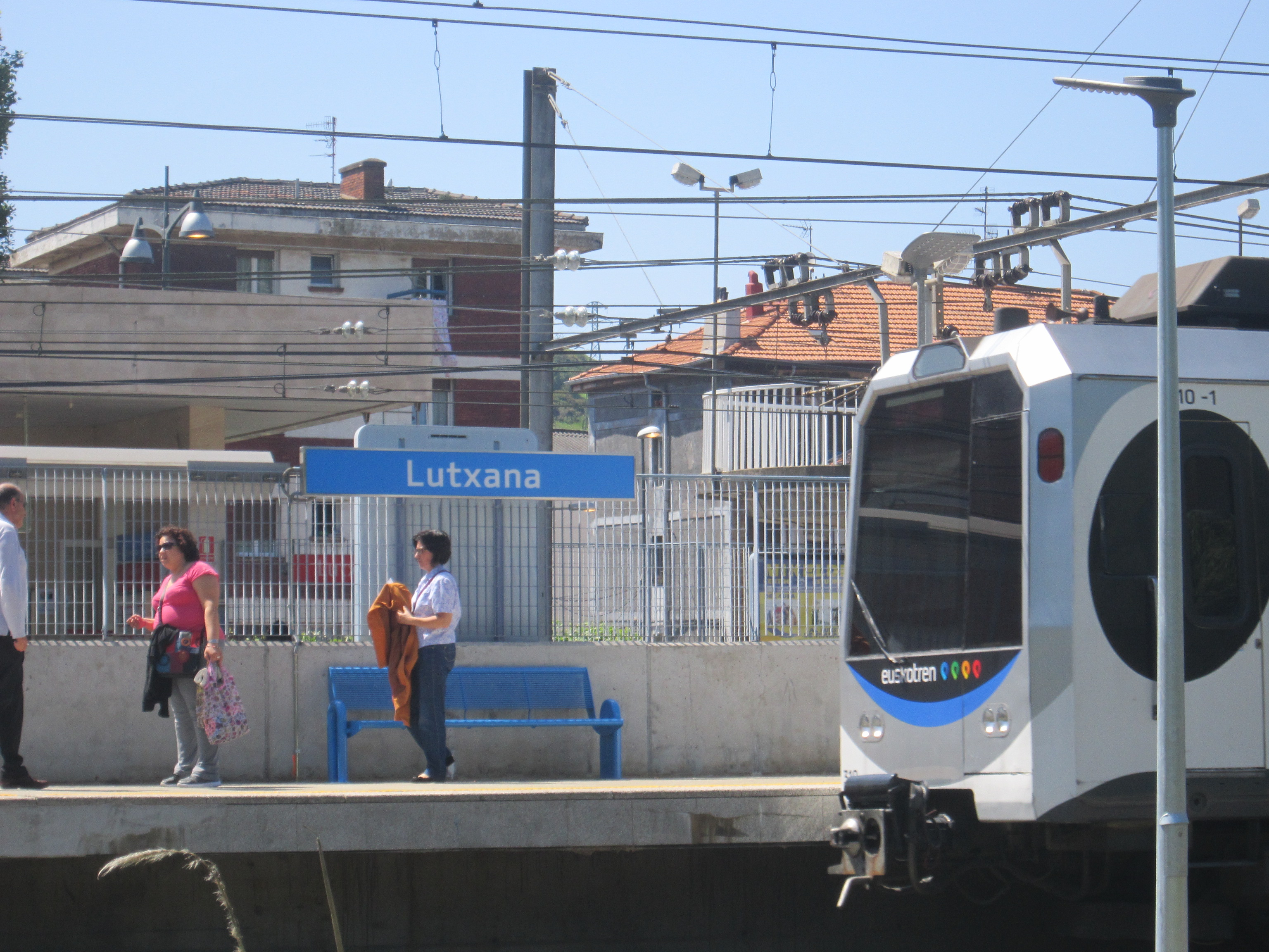 Unidad de Euskotren en la estación de Lutxana (Erandio)